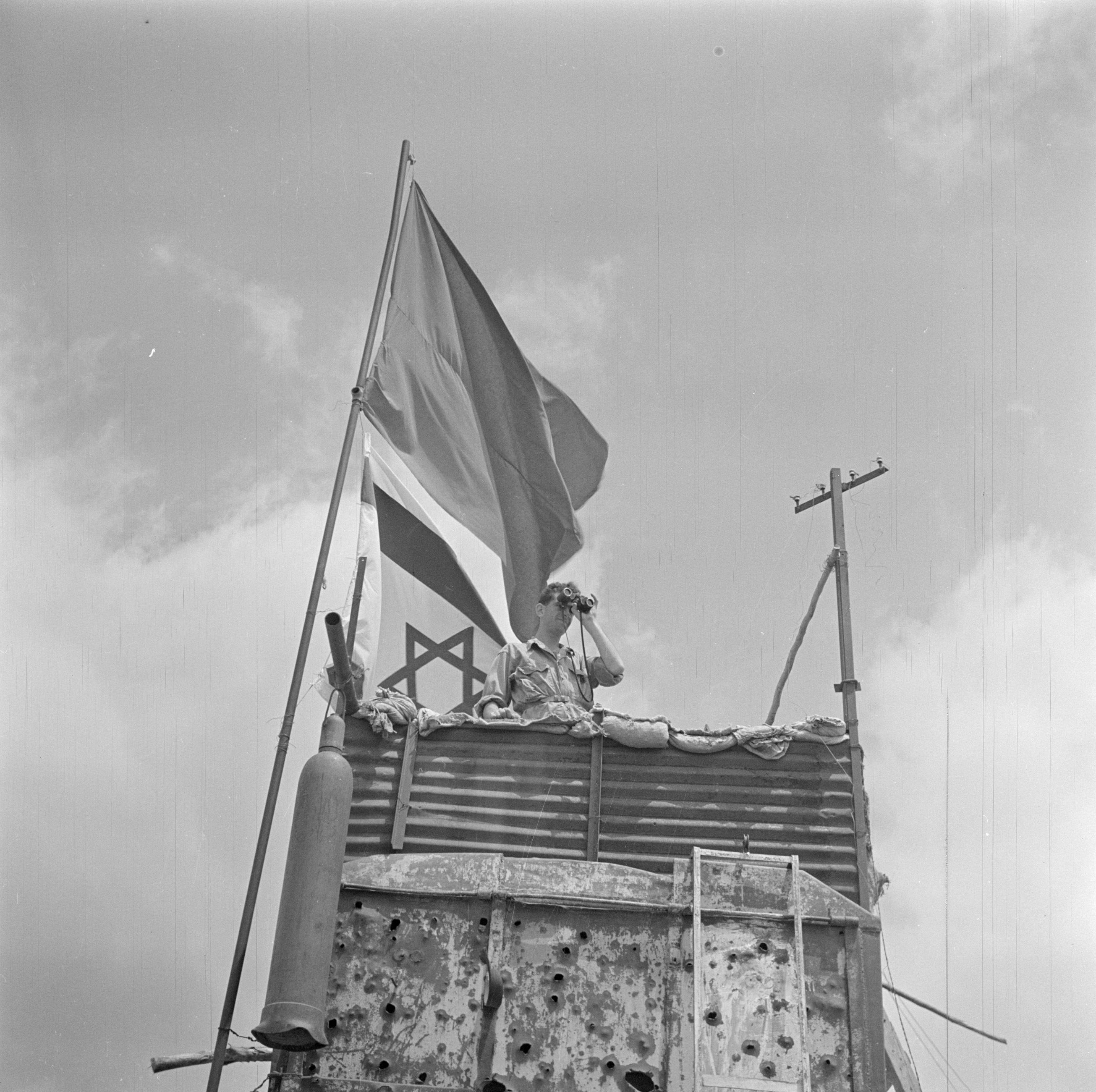 Collectie / Archief : Fotocollectie Van de Poll Reportage / Serie : Israël 1948-1949: kibboets Kwuzath Gezer Beschrijving : Door verrekijker turende soldaat op een uitkijkpost bij kibboets Kwuzath Gezer Datum : 1948 Locatie : Israël, Judea, Latrun Trefwoorden : kibboetsen, militairen, uitkijktorens, verrekijkers, vlaggen, waakzaamheid Fotograaf : Poll, Willem van de Auteursrechthebbende : Nationaal Archief Materiaalsoort : Negatief (zwart/wit) Nummer archiefinventaris : bekijk toegang 2.24.14.02 Bestanddeelnummer : 255-0622